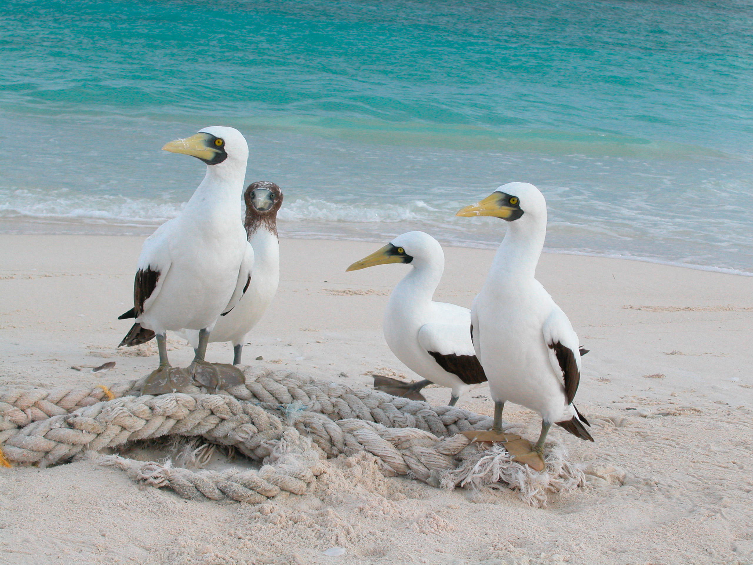 Sula dactylatra Masked boobies. Hawaii, Papahanaumokuakea Marine National Monument.